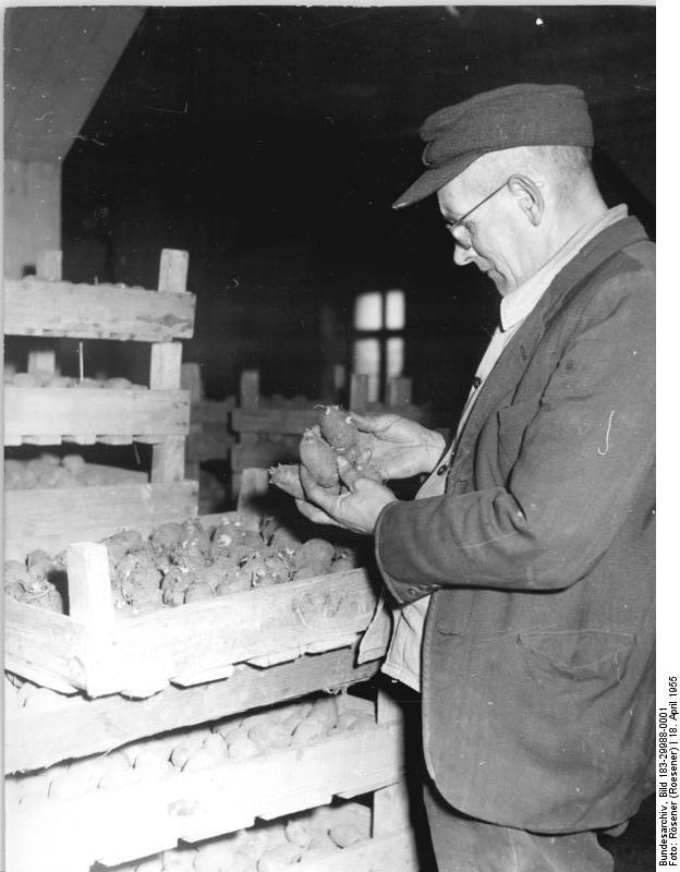 VEG Schwaneberg, Kontrolle von Saatkartoffeln Zentralbild Rösener 4 Motive 18.4.1955 Volksgut Schwaneberg schafft Voraussetzungen für hohe Erträge Auf Grund des Ministerratsbeschlusses vom 19.3.1955 zur Steigerung des tierischen und pflanzlichen Produktion haben sich die Landarbeiter des Volksgutes Schwanenberg Kreis Wanzleben , verpflichtet , 71 dz Rindfleisch , 271 dz Milch , 4.500 Eier , drei Doppelzentner Geflügel , 2000 dz hochwertiges Saatgetreide , 900000 dz Gemüse verschiedener Sorten und anderes mehr über den Plan hinaus abzuliefern . Dazu werden sie alle Neuerermethoden konsequent anwenden. UBz: Karl Koch von der Saatzuchtvorbereitung kontrolliert die zum Vorkeimen gelangenden Saatkartoffeln des Volksgutes.